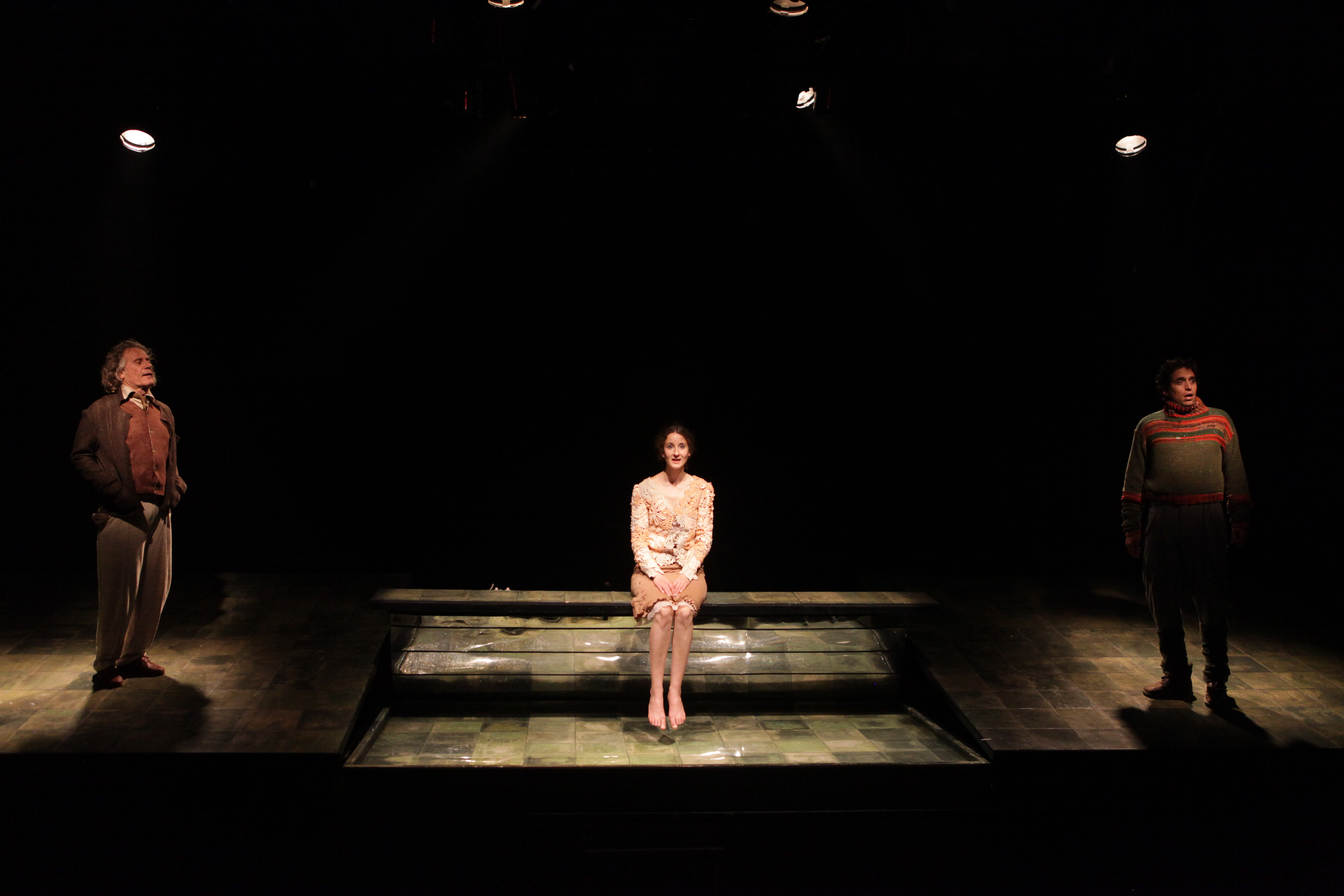 יואב היימן, אורית גל ואבי פניני ב"מולי סוויני", תיאטרון החאן